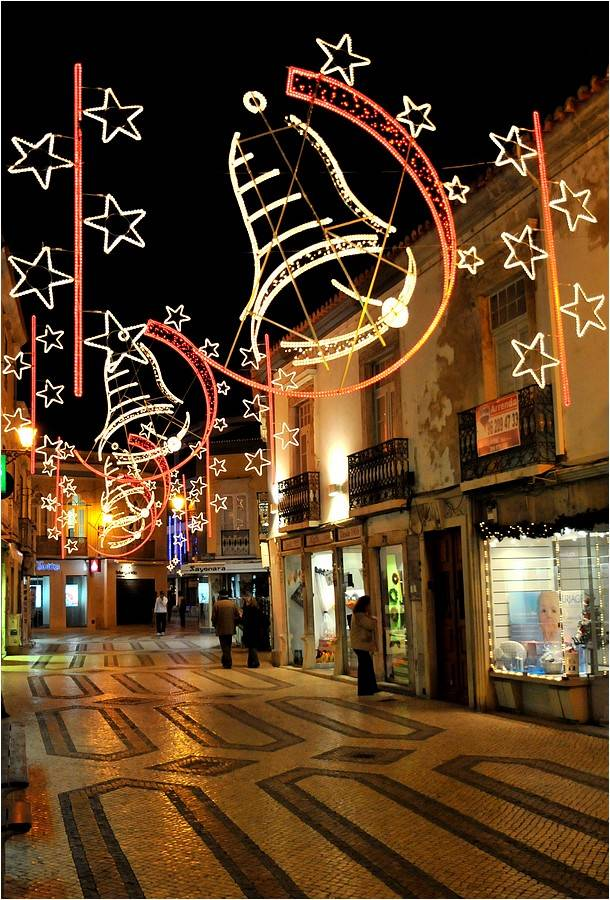 fotos tomadas no encontro da ALFA do 21 de Novembro